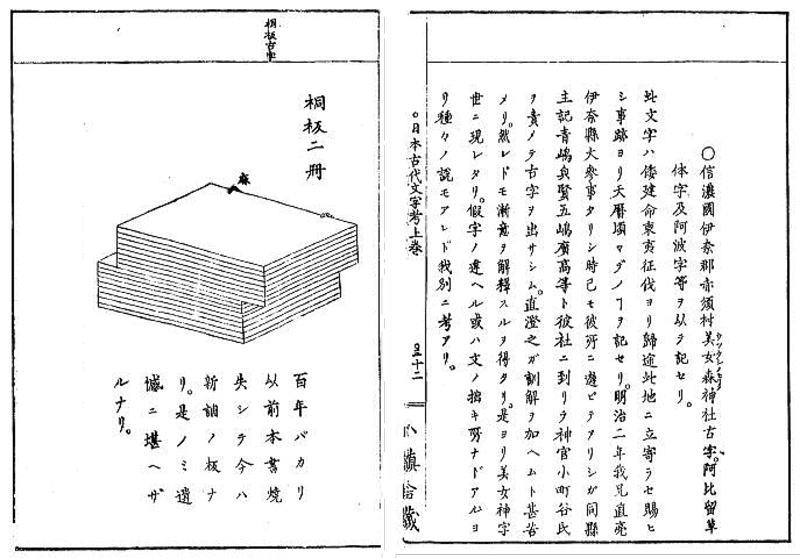 美しの杜神字録についての記述部分